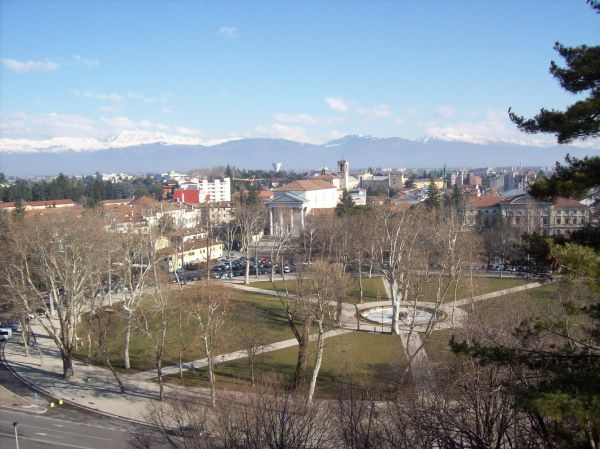 Udine-scorcio di Piazza I maggio